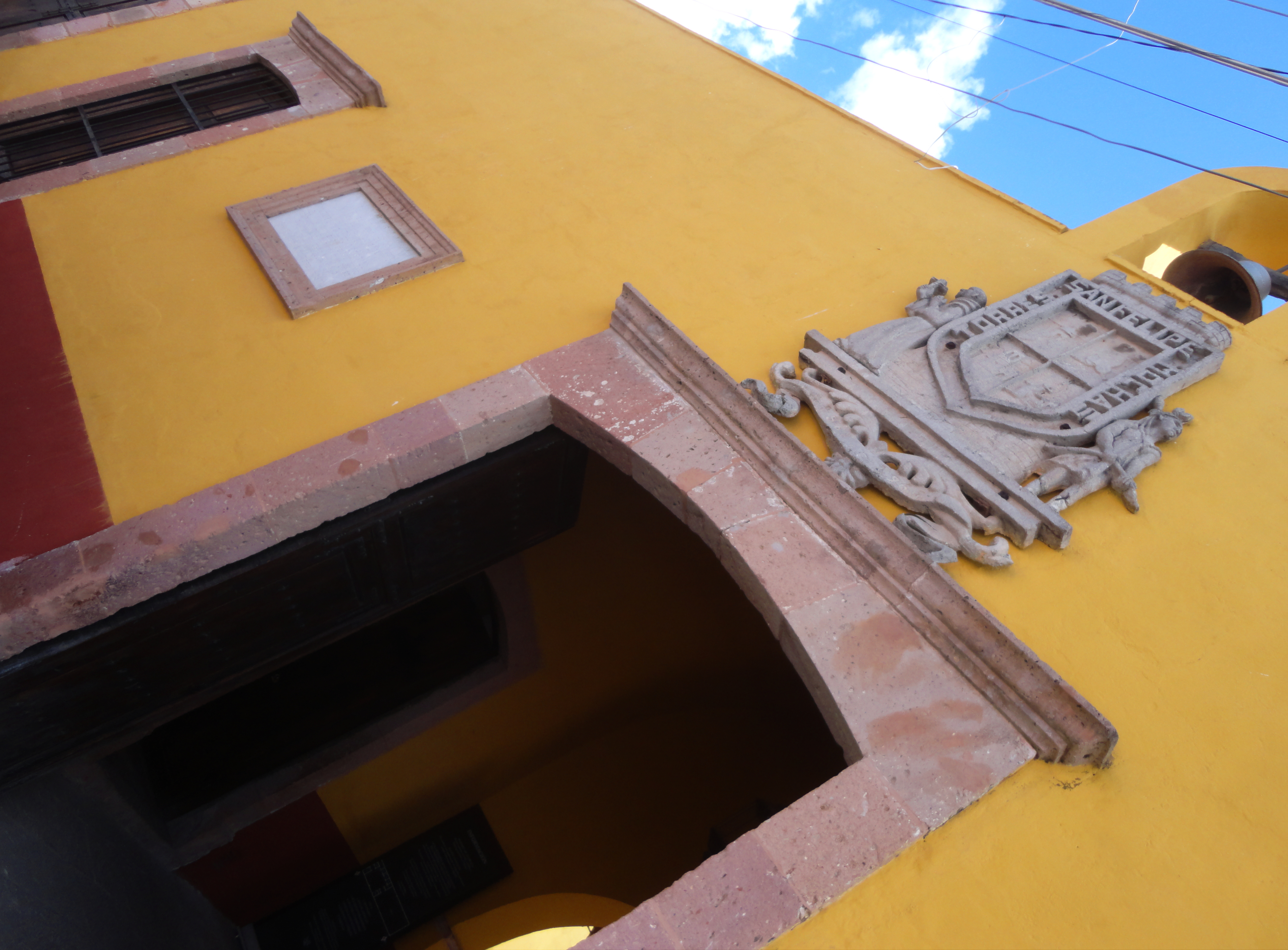 Casa de Miguel Hidalgo - La Francia Chiquita - San Felipe, Guanajuato, México.